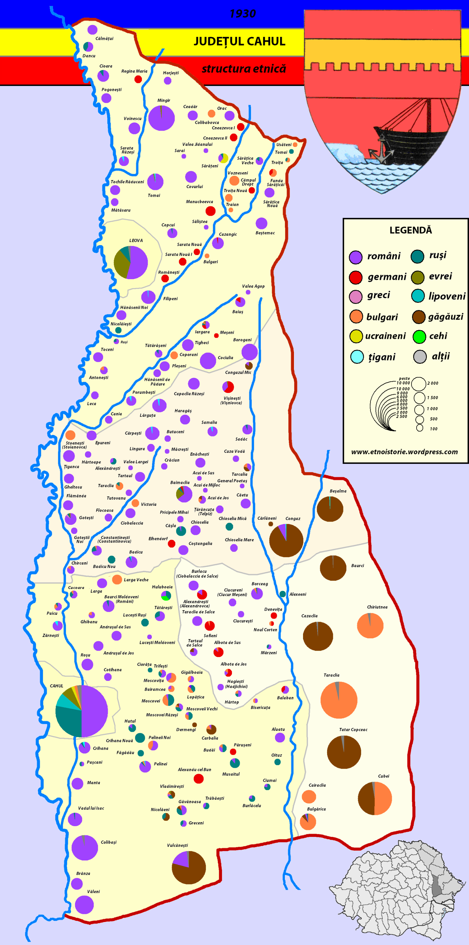 Structura etnică a judeţului Cahul (1930)